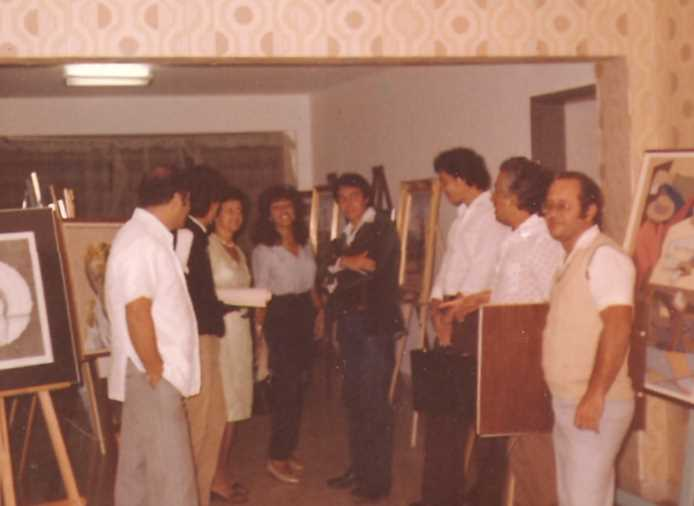 Exposición de Artistas Bolivarianos en la galería Mara.Maracaibo julio de 1983. Críticos de arte Alberto Bedoya Polanco, Mérida Torres, pintores Elzer Becerra,Pedro Barrientos, Miguel Antel Suárez